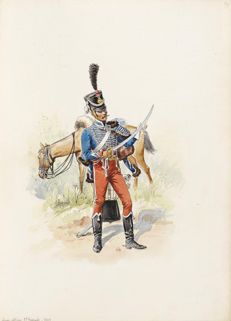 Sous-Officier du 1er Hussards en 1809